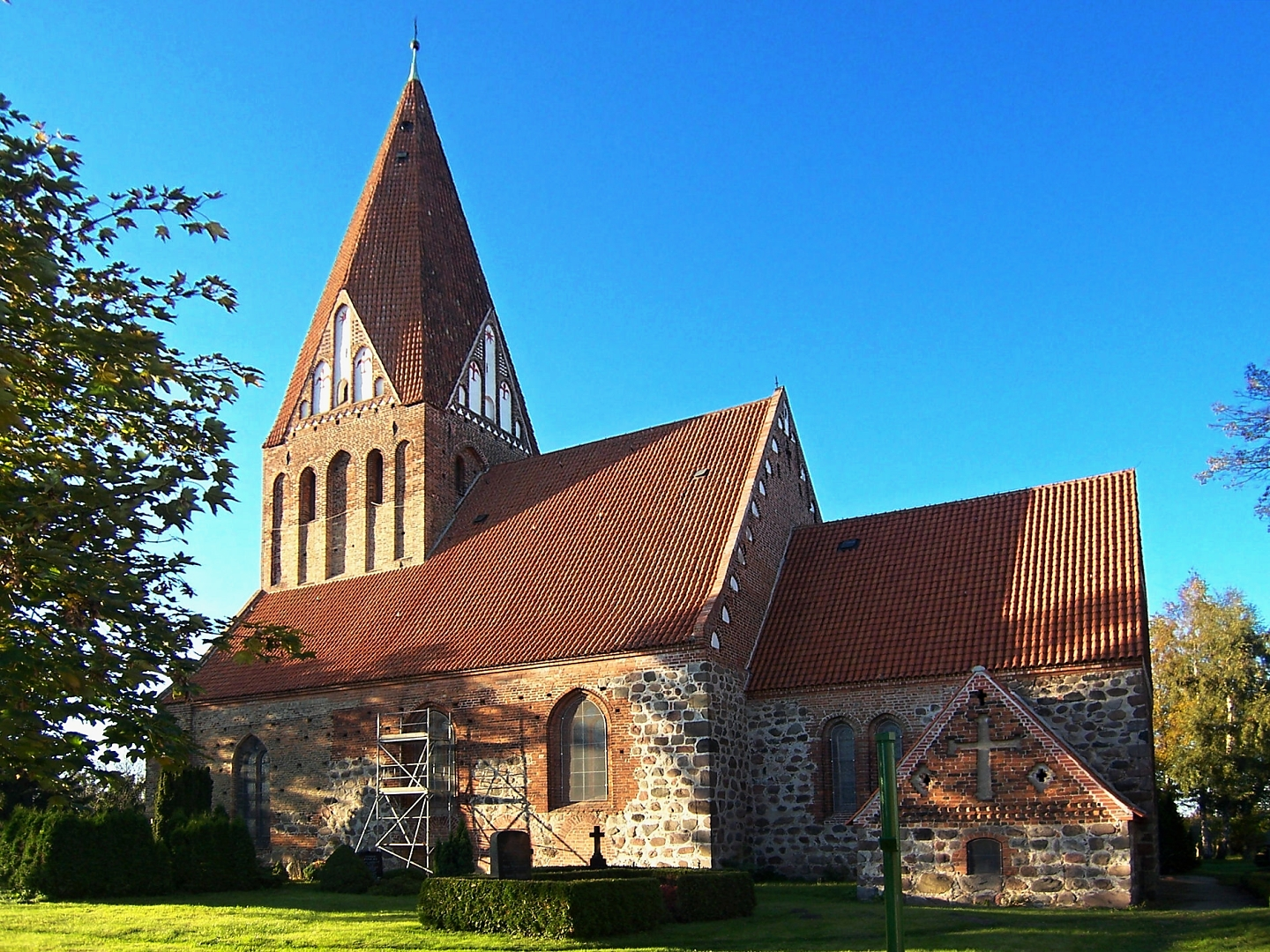 Dorfkirche in Parkentin